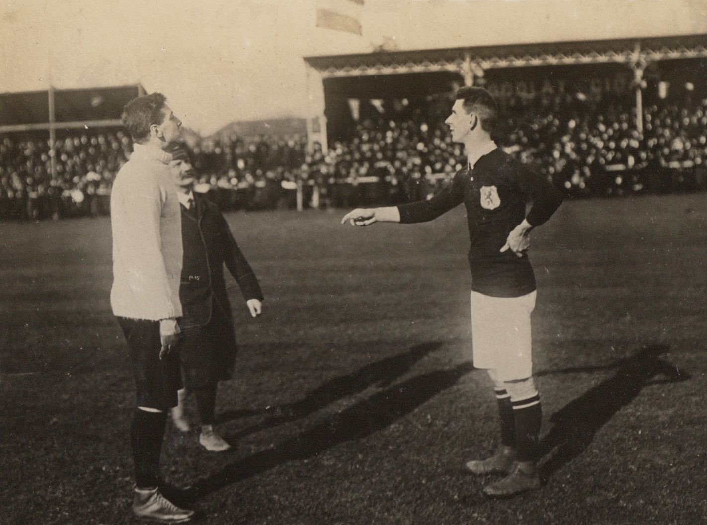 De Belgische aanvoerder Feye, de Engelse scheidsrechter Schumacher en de Nederlandse aanvoerder Otten bij de toss. België - Nederland (3-2, na verlenging), gespeeld op 13 maart 1910 op het Beerschot-terrein te Antwerpen. Opstelling: Reinier Beeuwkes (DFC), John Heijning (HVV), Louis Otten (Quick den Haag, aanvoerder), Karel Heijting (HVV), Bok de Korver (Sparta), Vic Gonsalves (HBS), Piet van der Wolk (Sparta), Guus Lutjens (HVV), Cas Ruffelse (Sparta), Mannes Francken (HFC) en Dé Kessler (HVV).